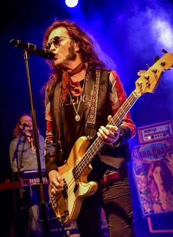 Glenn Hughes en vivo en 2019